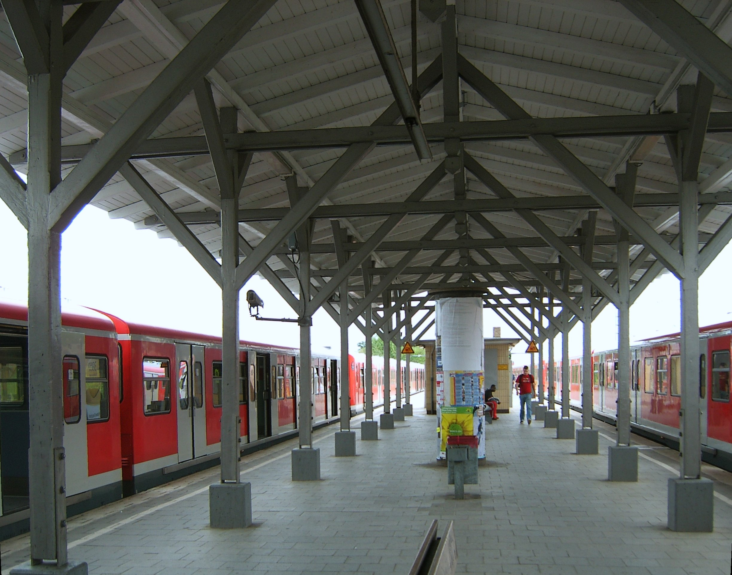 Der Bahnhof Rothenburgsort in Hamburg.